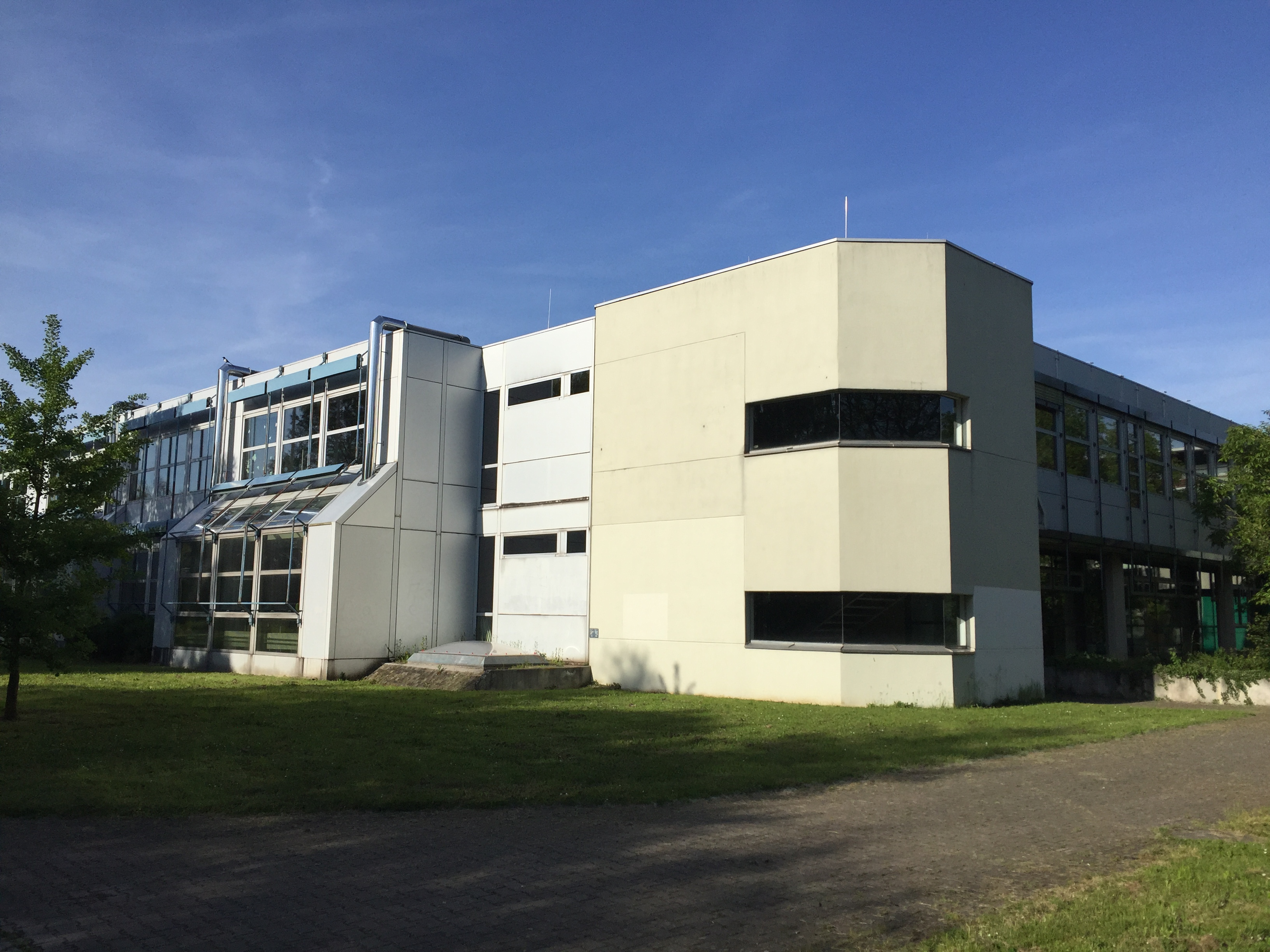 Thomas-Mann-Gymnasium Blankenloch